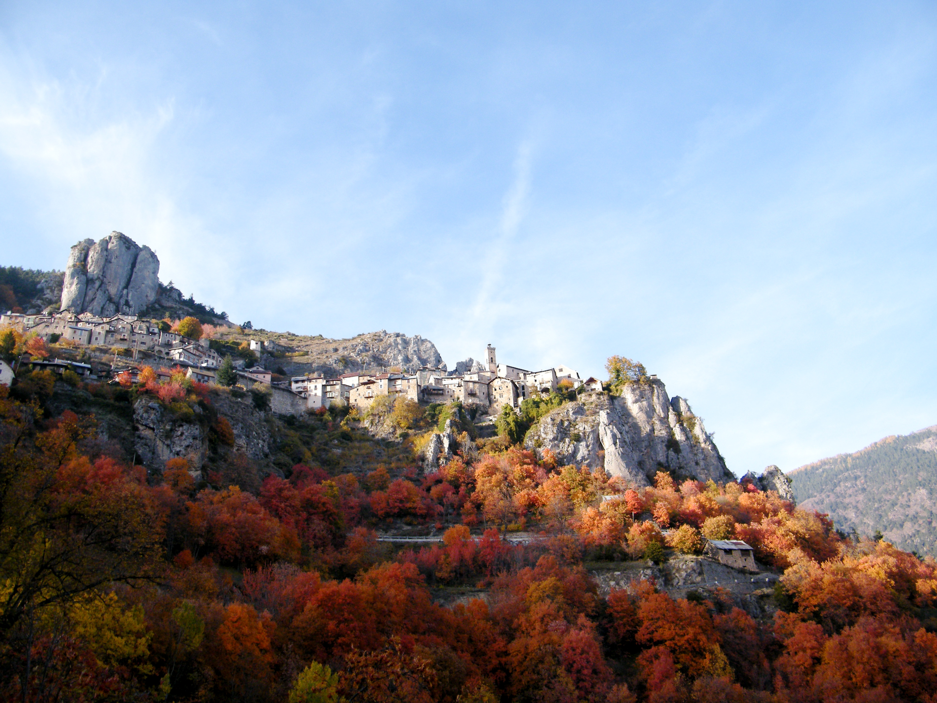 Village de Roubion en automne